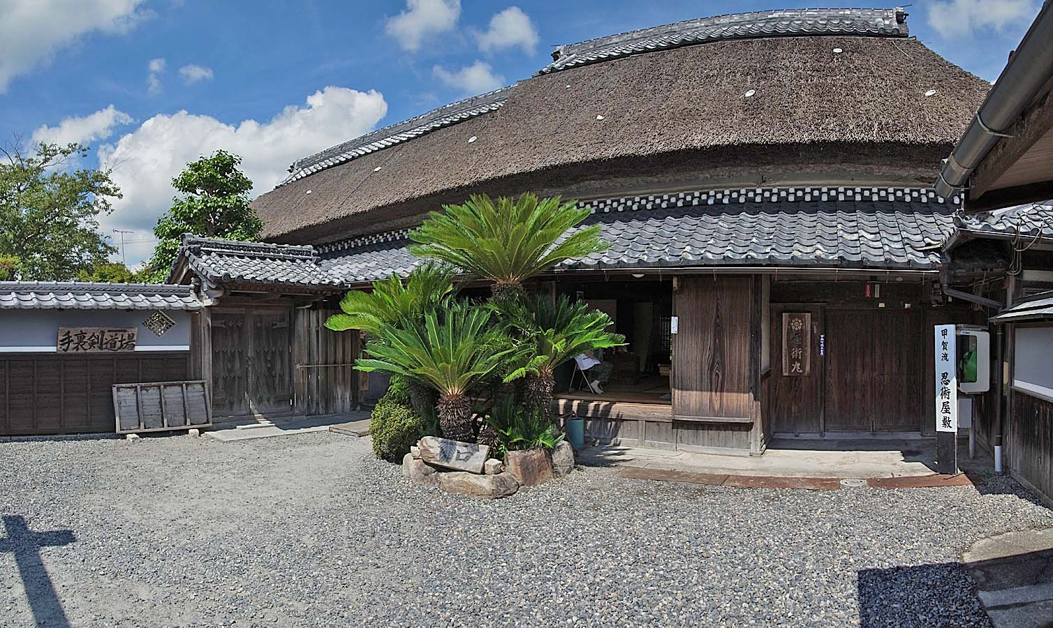 Koga-ryu Ninjya house , 甲賀流 忍術屋敷